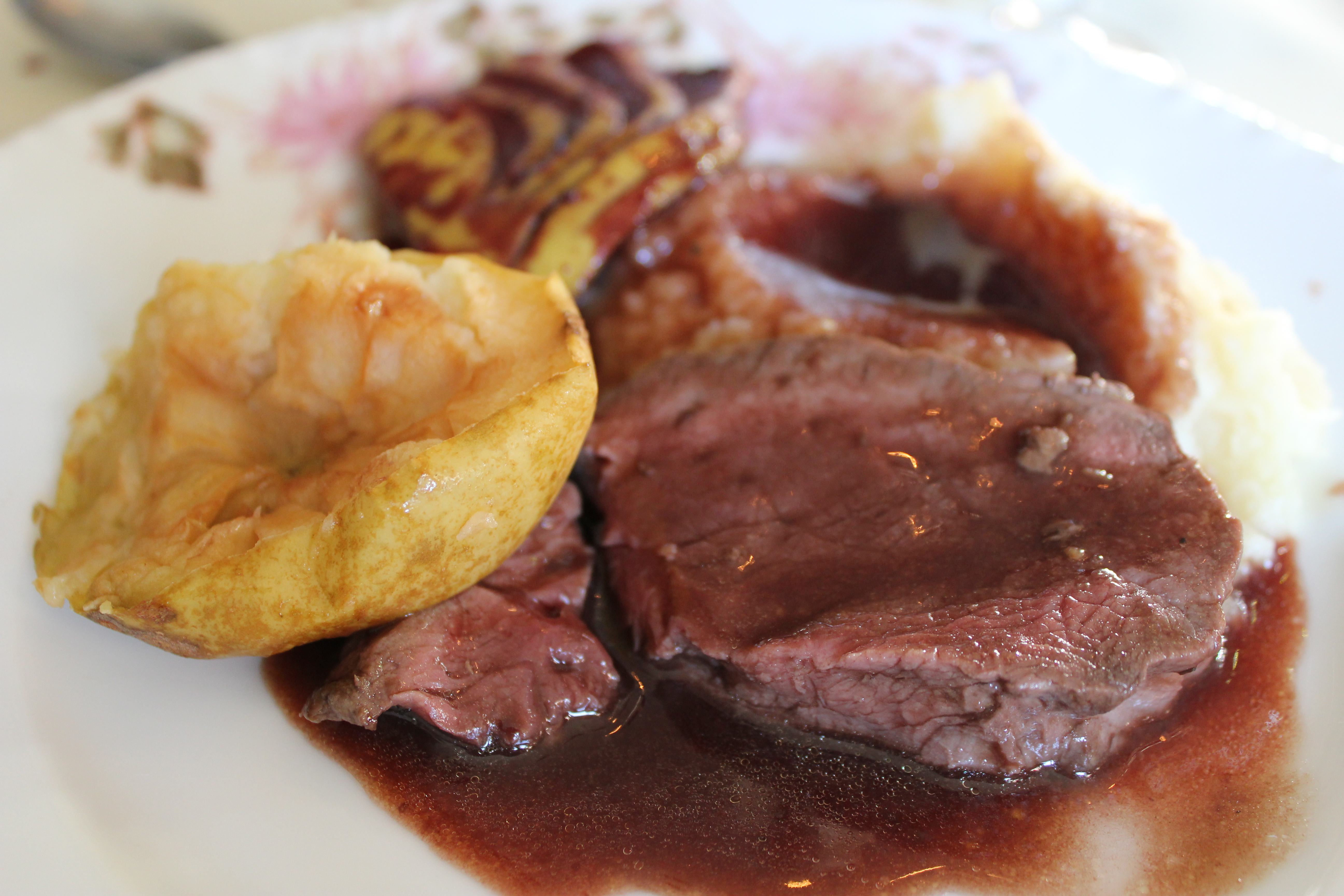 Sauce Grand Veneur der klassischen französischen Küche, wörtlich Sauce Großjägermeister. Hergestellt durch Reduktion von Rotwein, verfeinert mit Schalotten, Butterschmalz, Thymian, Lorbeerblatt, Mehl, Essig, dunklem Wildfond, dunklem Kalbsfond, Rinderbrühe oder Kalbsbrühe und Johannisbeergelee